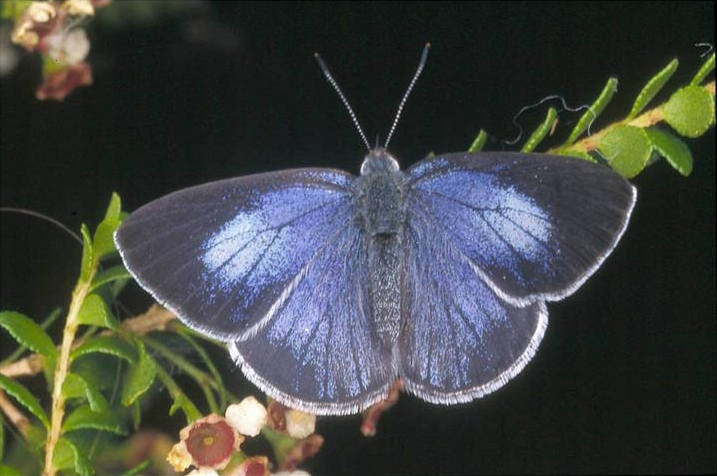 Candalides absimilis edwarsi female